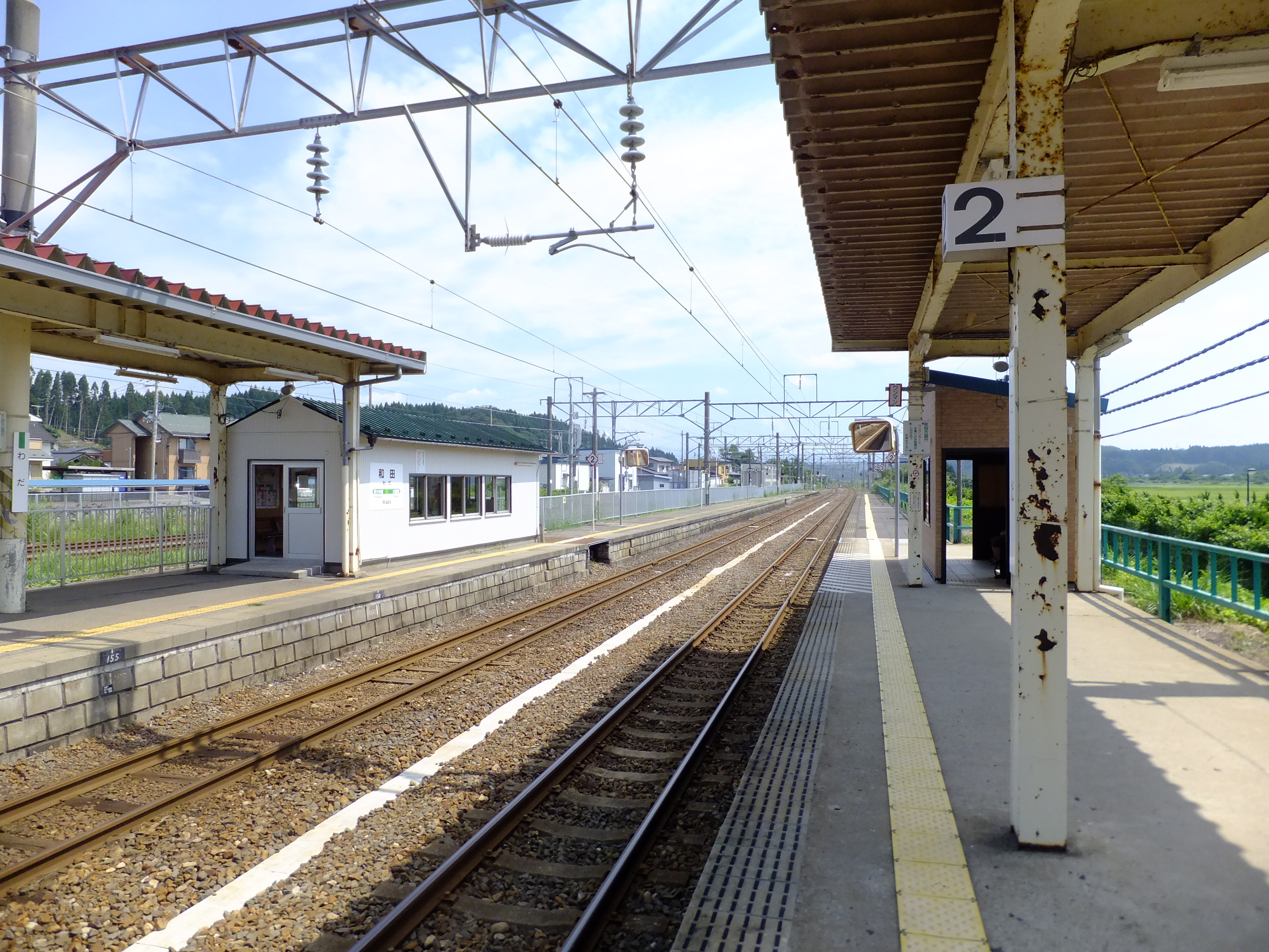 奥羽本線和田駅、プラットホーム